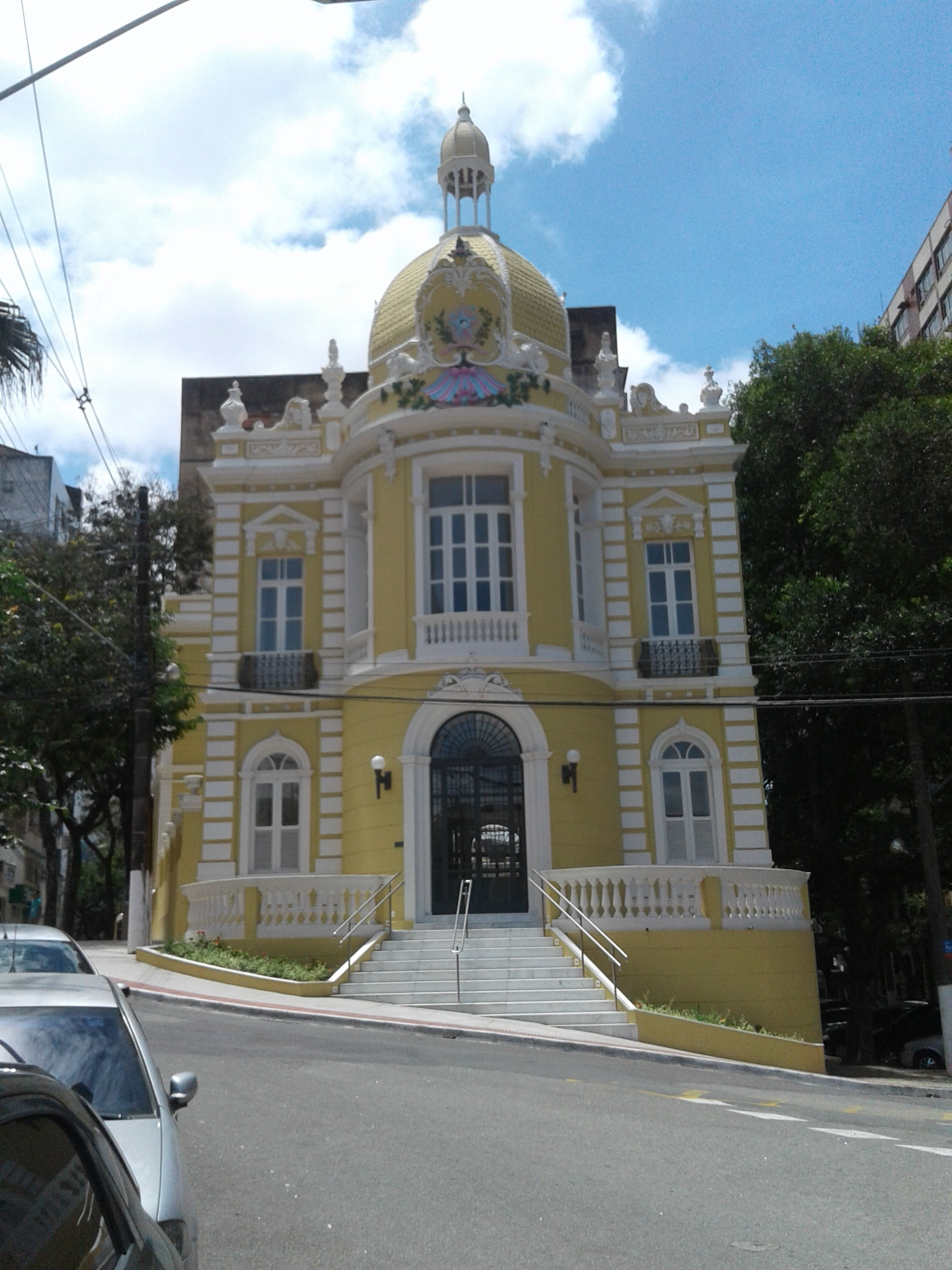 Vista da Fachada do Palácio da Cultura Sônia Cabral em 2016.